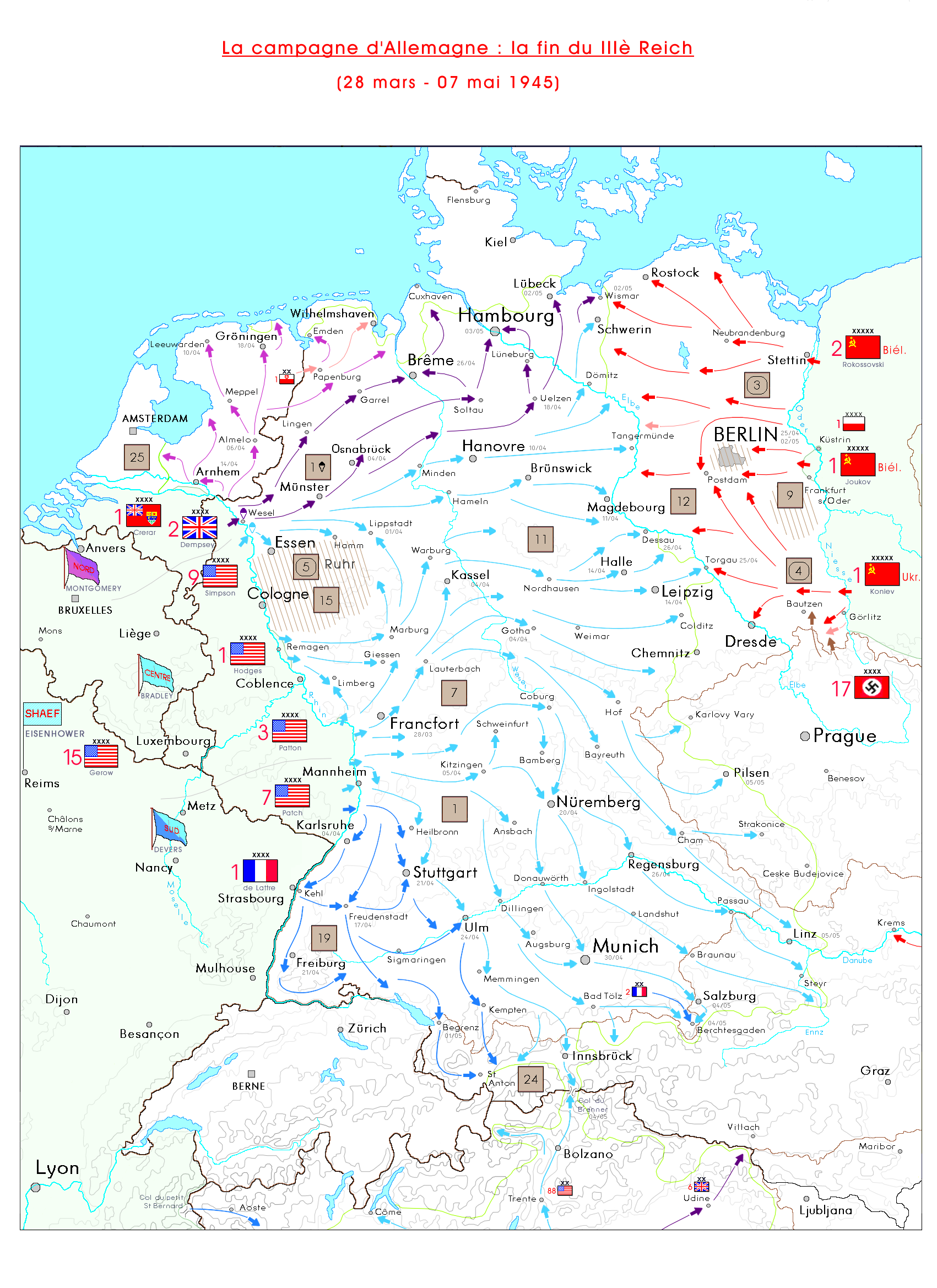 La fin du IIIè Reich